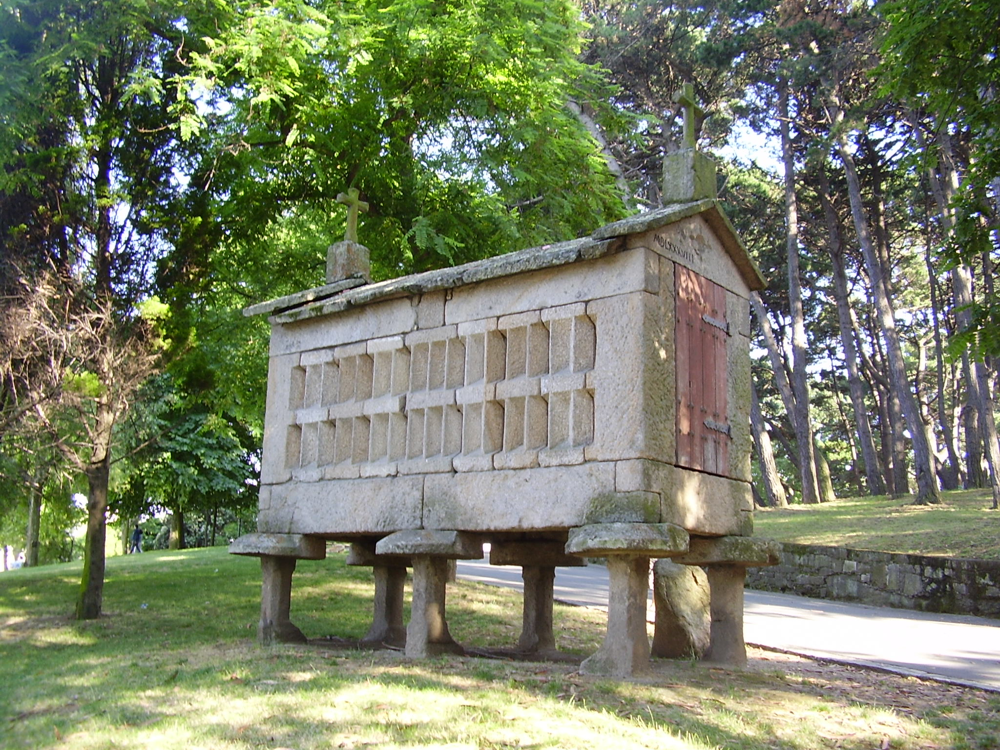 Hórreo del Parque de Santa Margarita